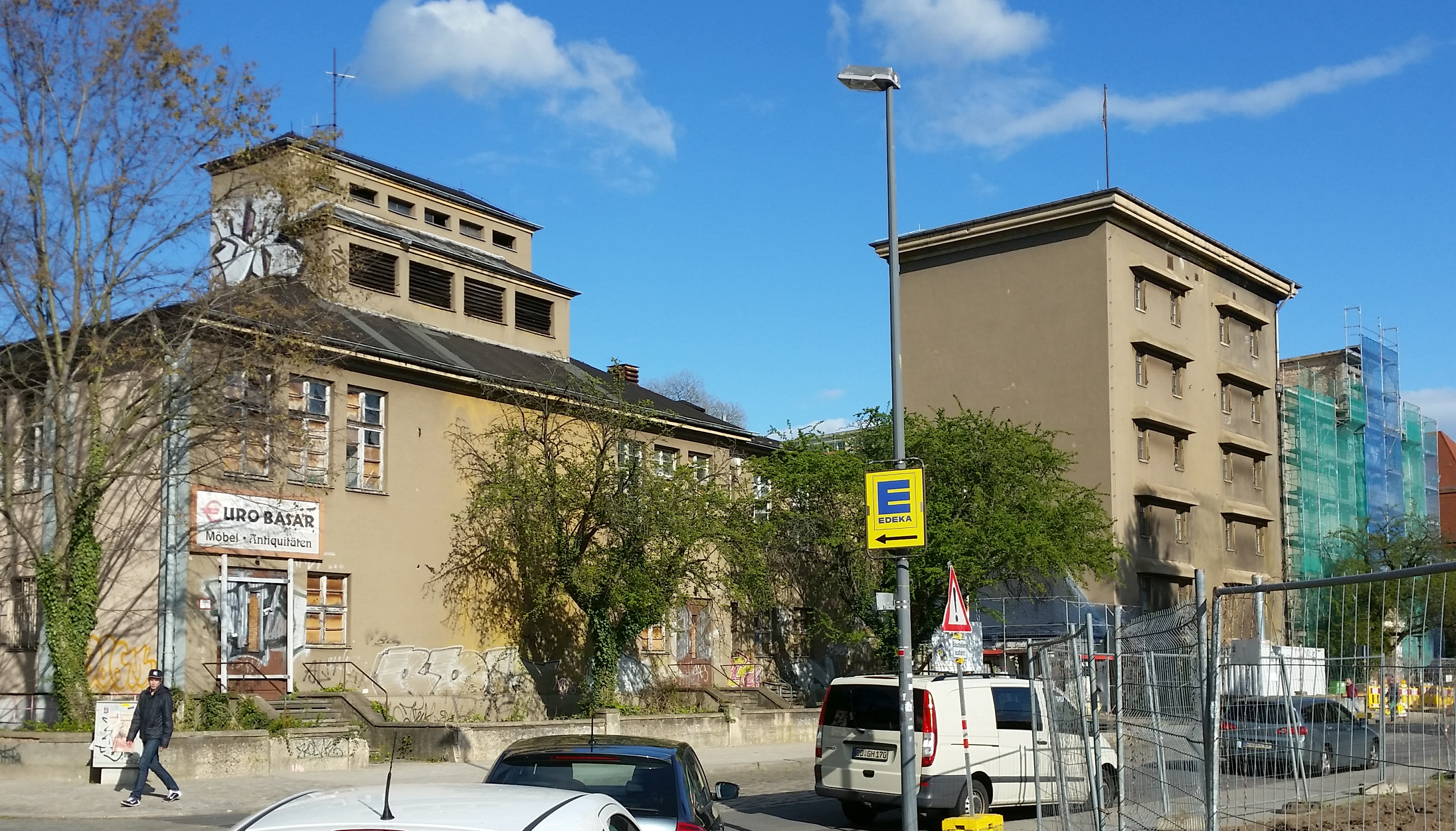 Das ehemalige Goehle-Werk in Dresden-Pieschen